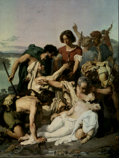 Zenobie retrouvee par les bergers sur les bords. Zenobia found by the shepherds on the Banks of the Aras River